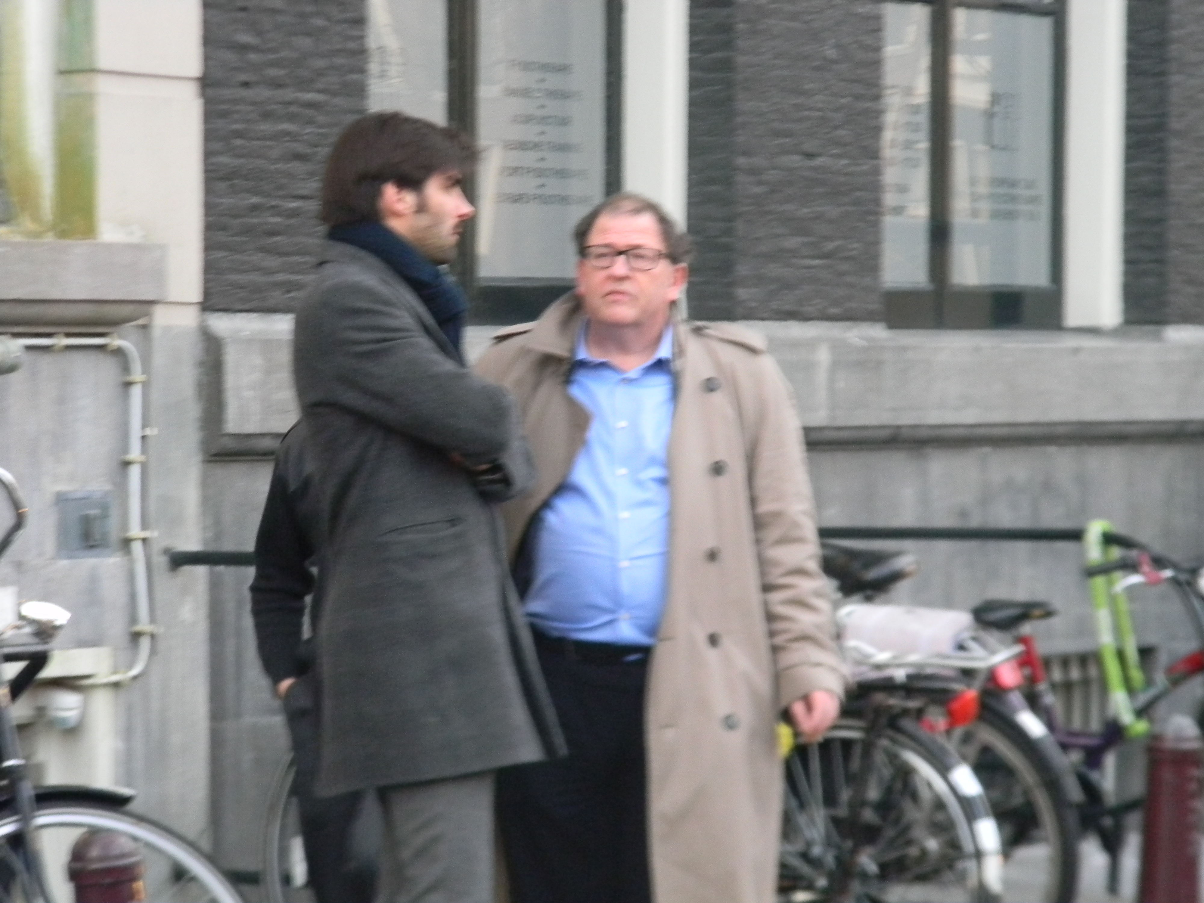 Politiek commentator Max van Weezel (rechts) in gesprek met collega Thijs Niemandsverdriet voor het partijbureau van de Partij van de Arbeid op de dag dat Job Cohen zijn aftreden als partijleider bekendmaakte.